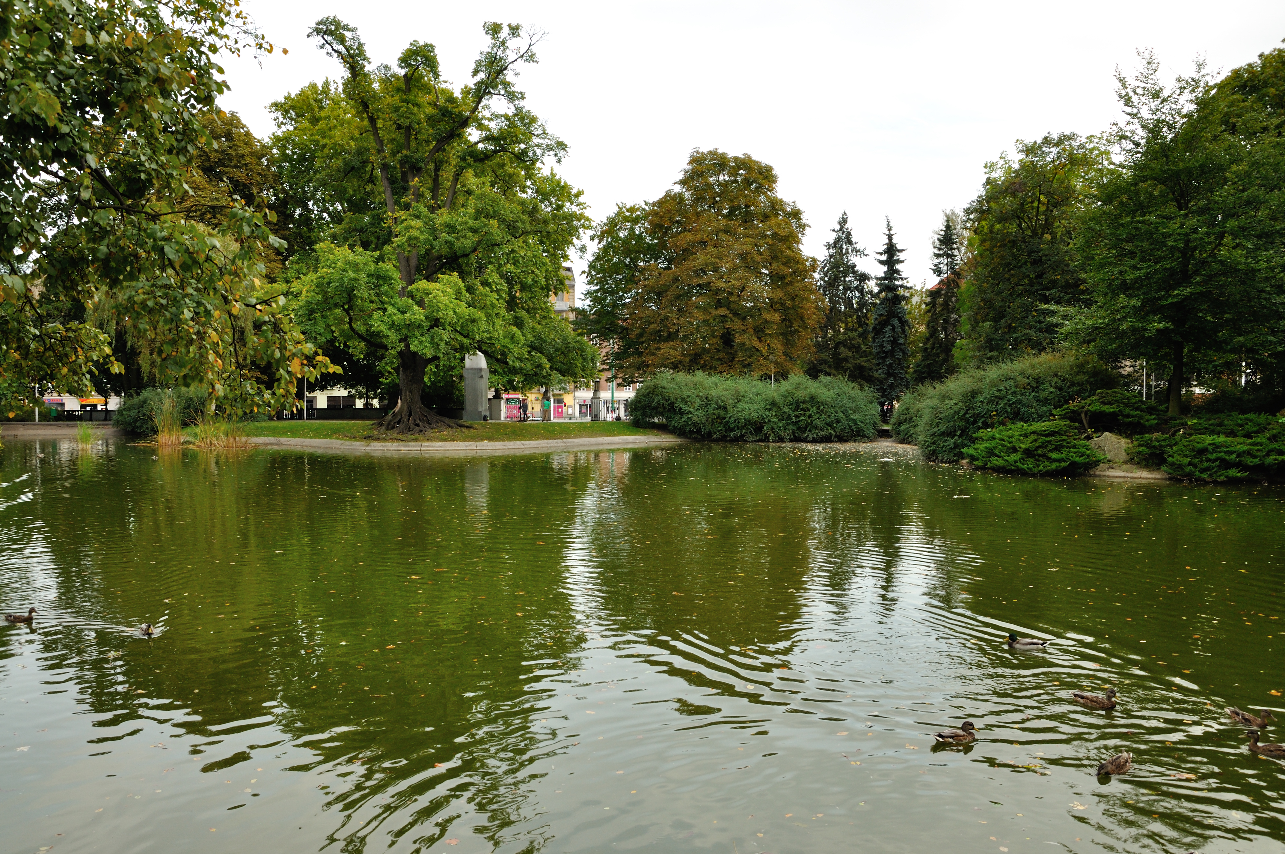 Poznań, park Wilsona, 1901, XX